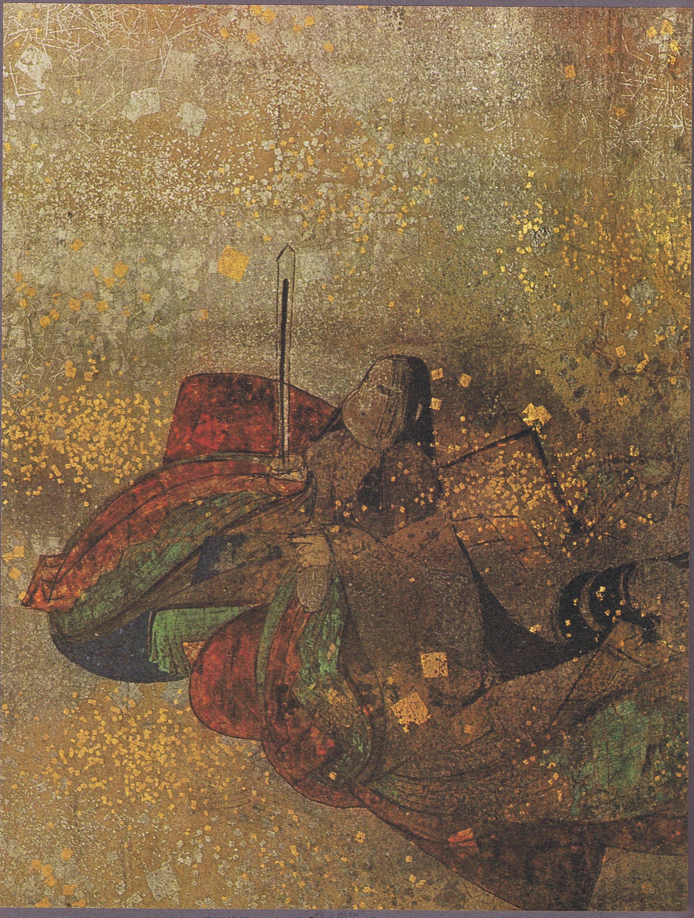 長寛2年（1164年）平清盛が一門の繁栄を祈って厳島神社に奉納した装飾経33巻。法華経に絵画や金銀箔で装飾が施されている。